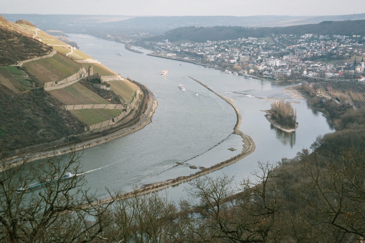 eigenes Foto 2004 Peter Weller Binger Loch heute